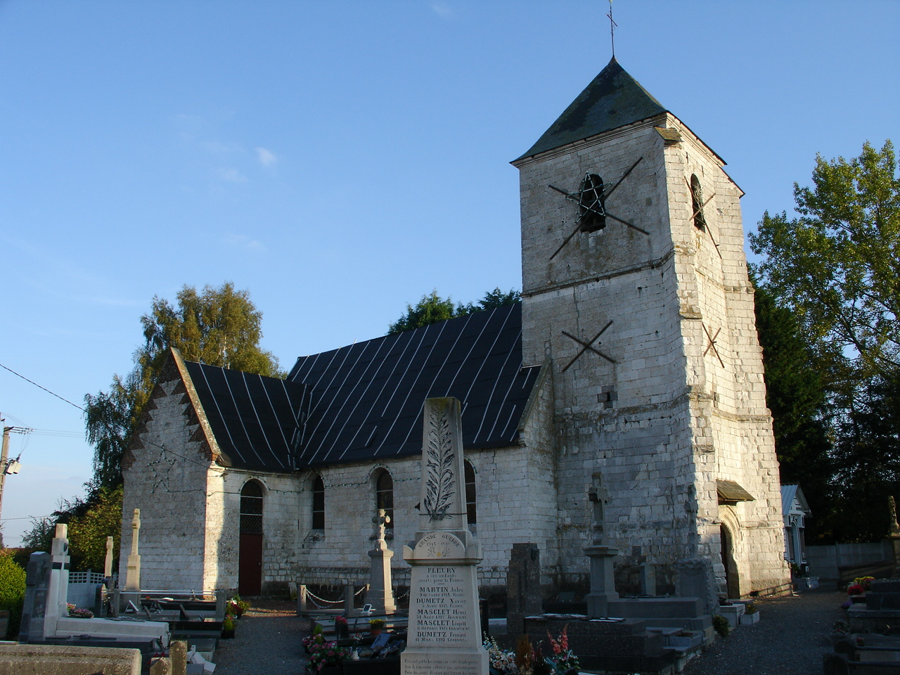 Église de Fleury